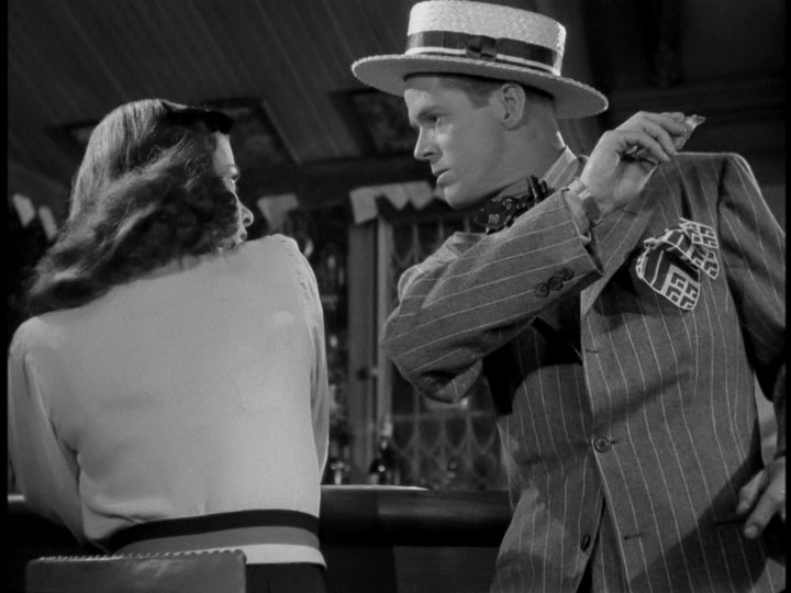 「スカーレット・ストリート」におけるダン・デュリエとジョーン・ベネット